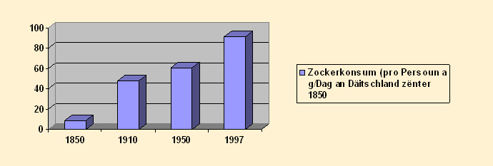 Diagramm Zockerkonsum